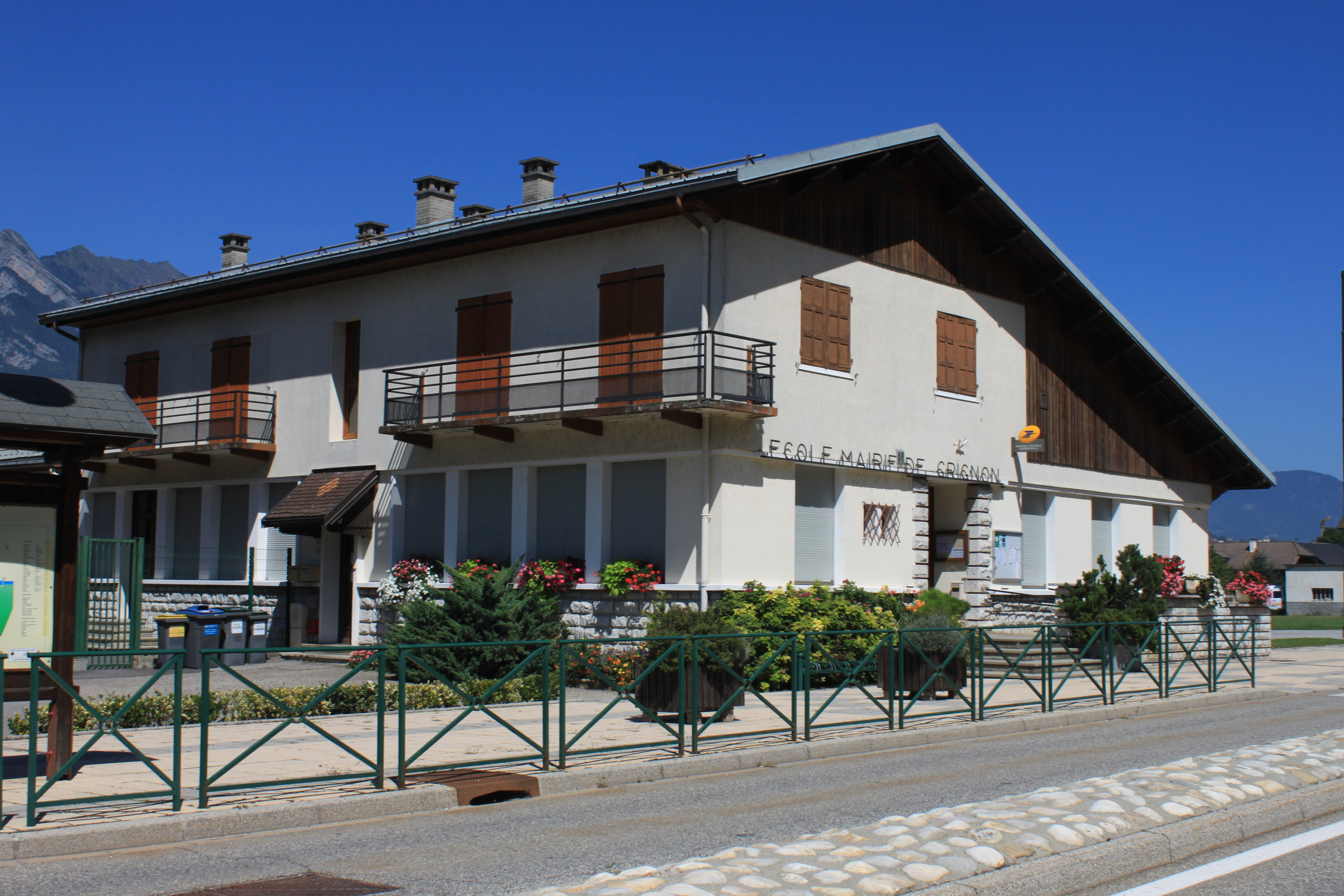 L'école et la mairie de Grignon (Savoie)